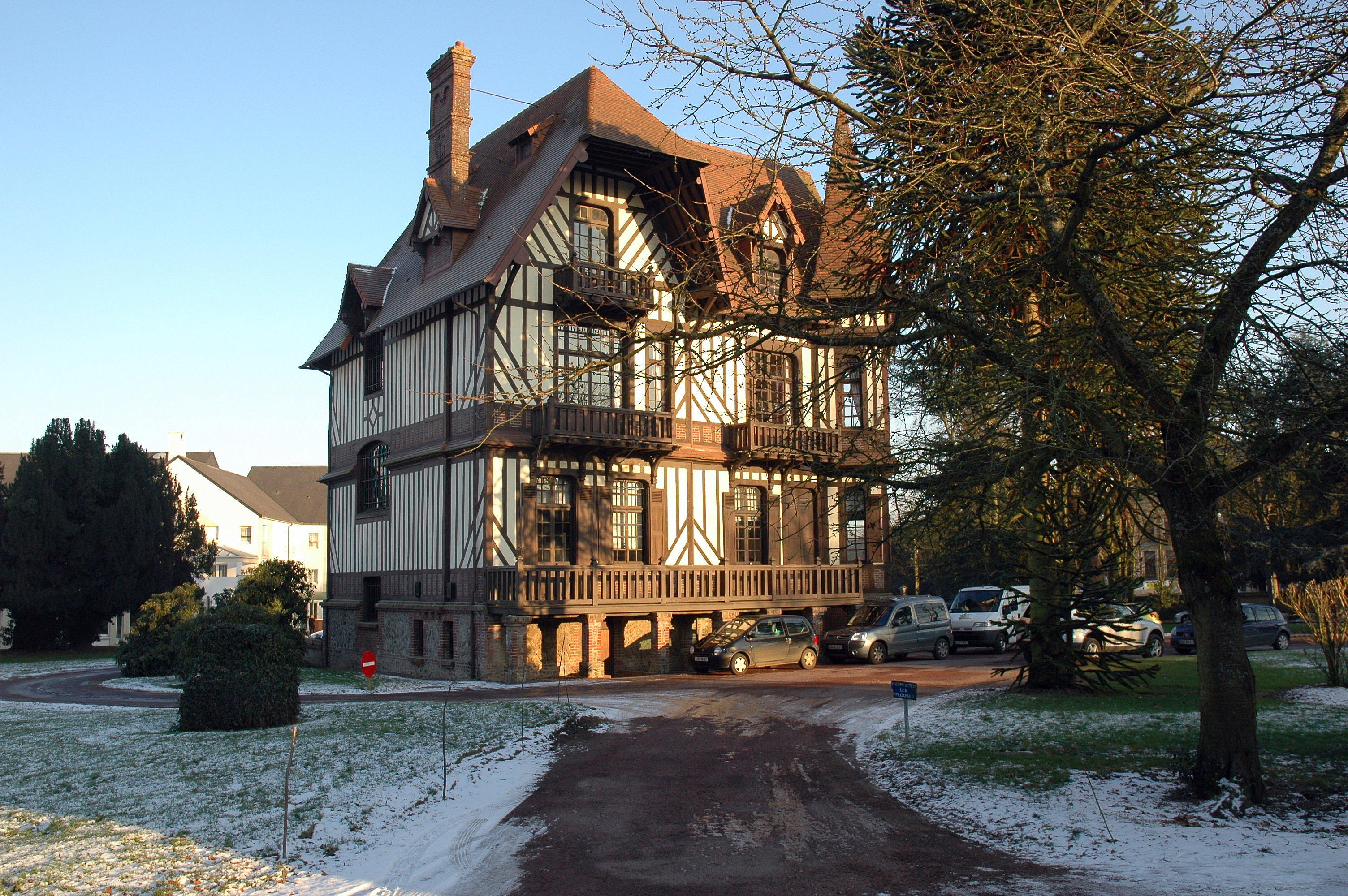 Le manoir du Logis, bâtisse de 1902 - maître d'œuvre : le maire Léon Octave Gruel - Acquisition par le SIVOM en 1985. Converti en résidence pour personnes âgées (RPA), incluse dans le parc qui, en 2017, héberge la RPA Jean-Guenier - Bourgtheroulde-Infreville (Eure, France).